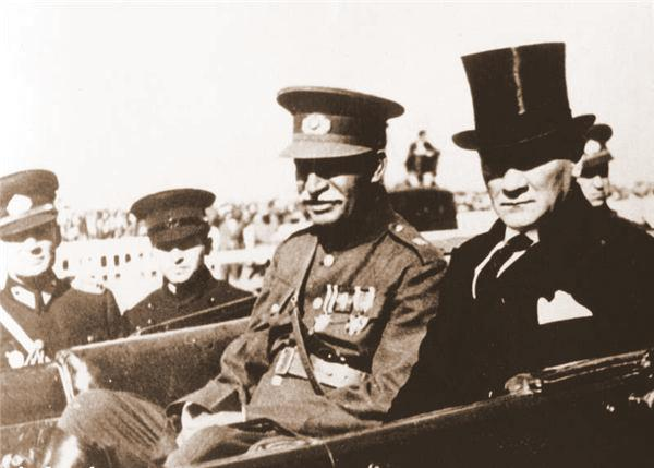 رضا شاه پهلوی به همراه مصطفی كمال پاشا ( آتاتورك ) سوار بر اتومبیل در حال بازدید از تركیهTürkçe: Rıza Şah Pehlevi Türkiye'yi ziyaret ederken Mustafa Kemal Paşa (Atatürk) ile arabada.